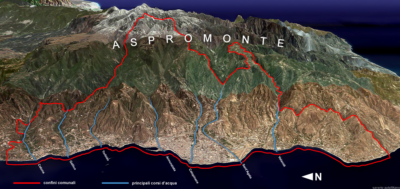 illustrazione che mostra la geografia del comune di Reggio Calabria.